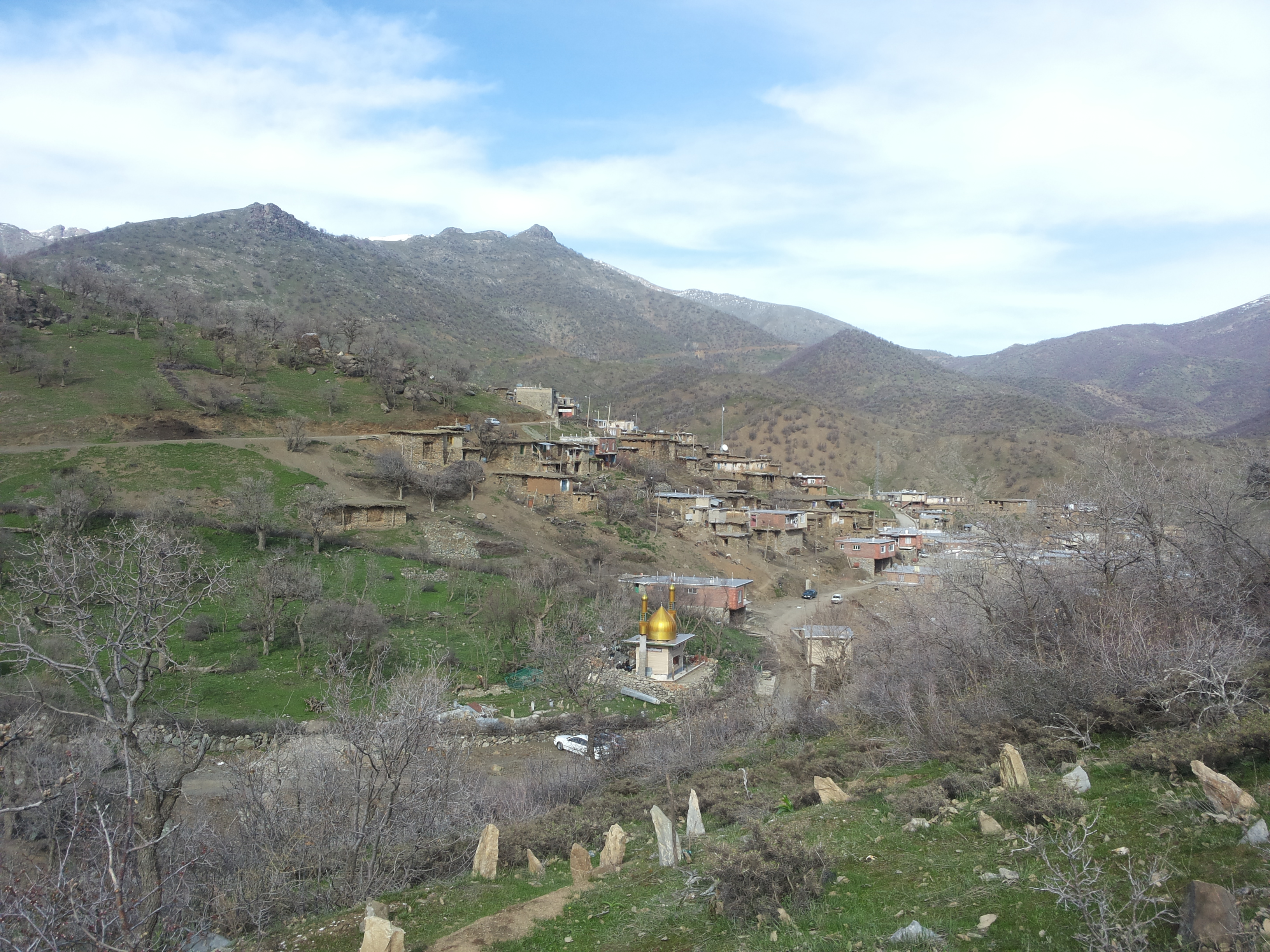 کوردی: وێنەیەک لە مەزاری پیریۆنس کە گوندی ھەنجیرانی لێوە دیارە